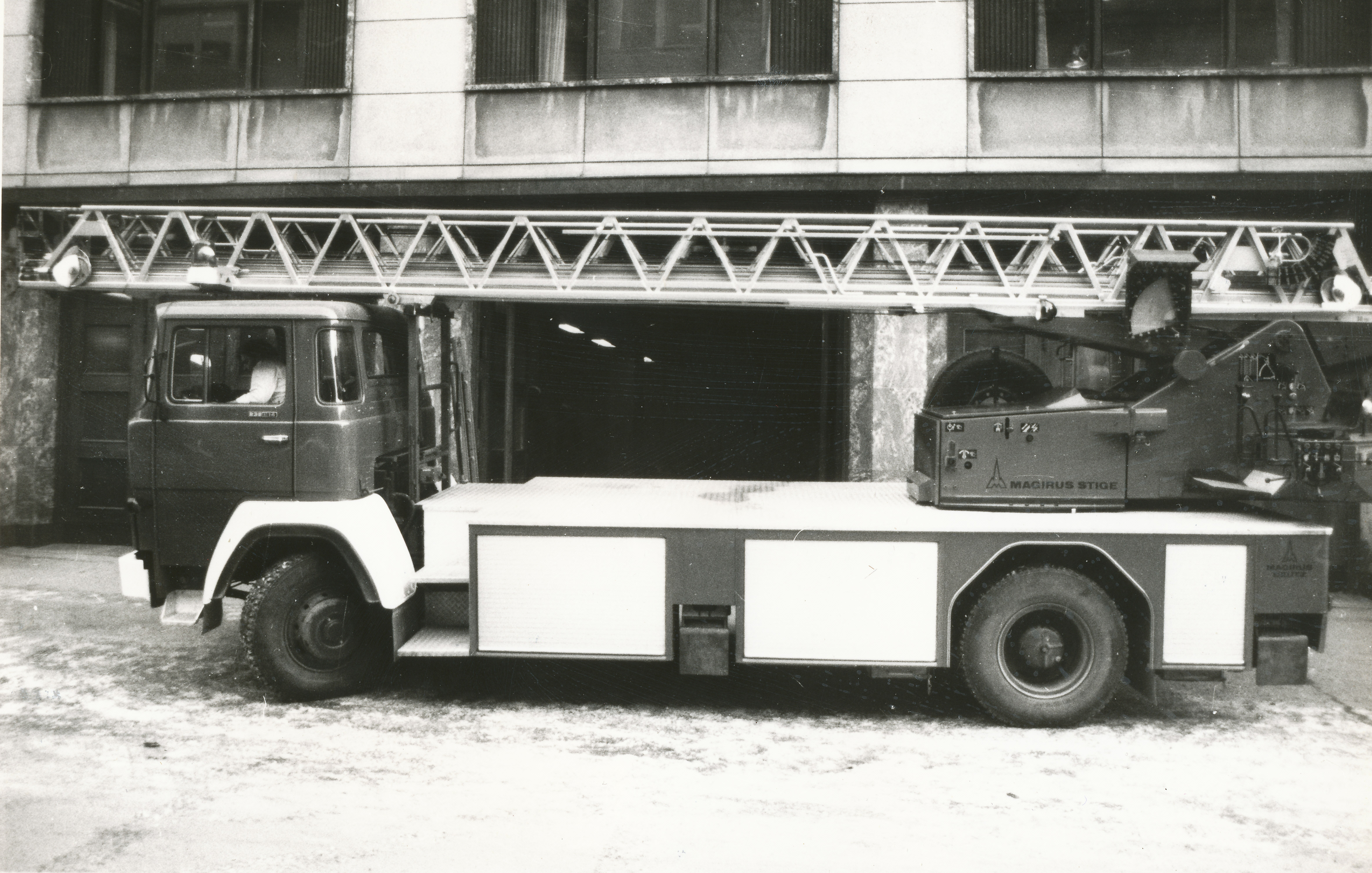 1978-modell Magirius 232-D 14-F 232 HK-DIN Stige. 30M. 2 mann. Ukjent fotograf, ukjent år. Fra Trondheim Brannvesens arkiv.